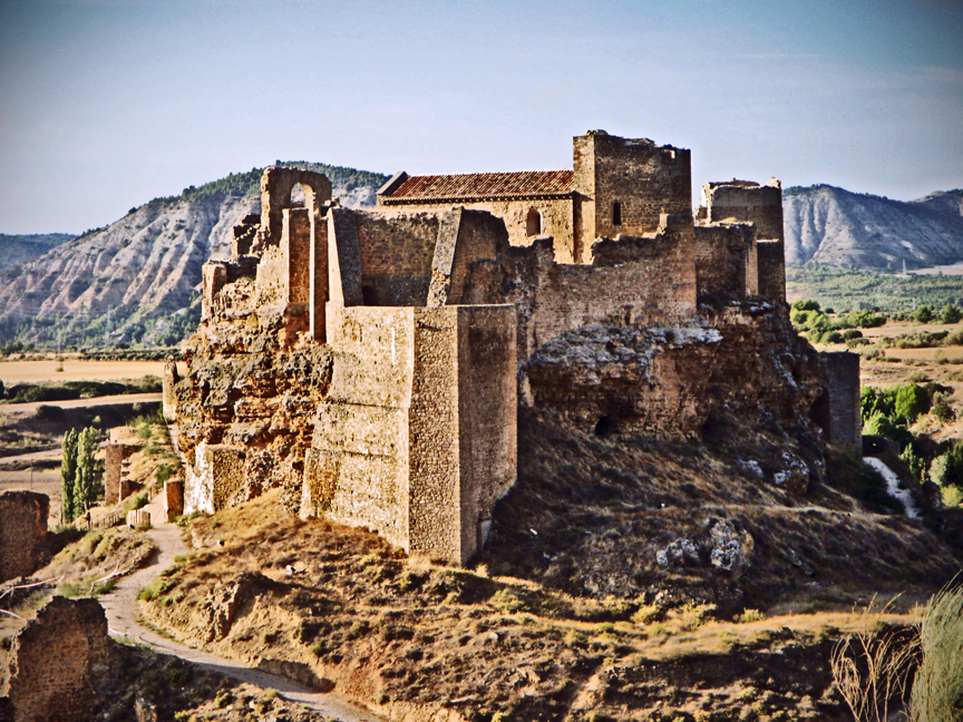 Alcazaba. Castillo de Zorita de los Canes. Guadalajara